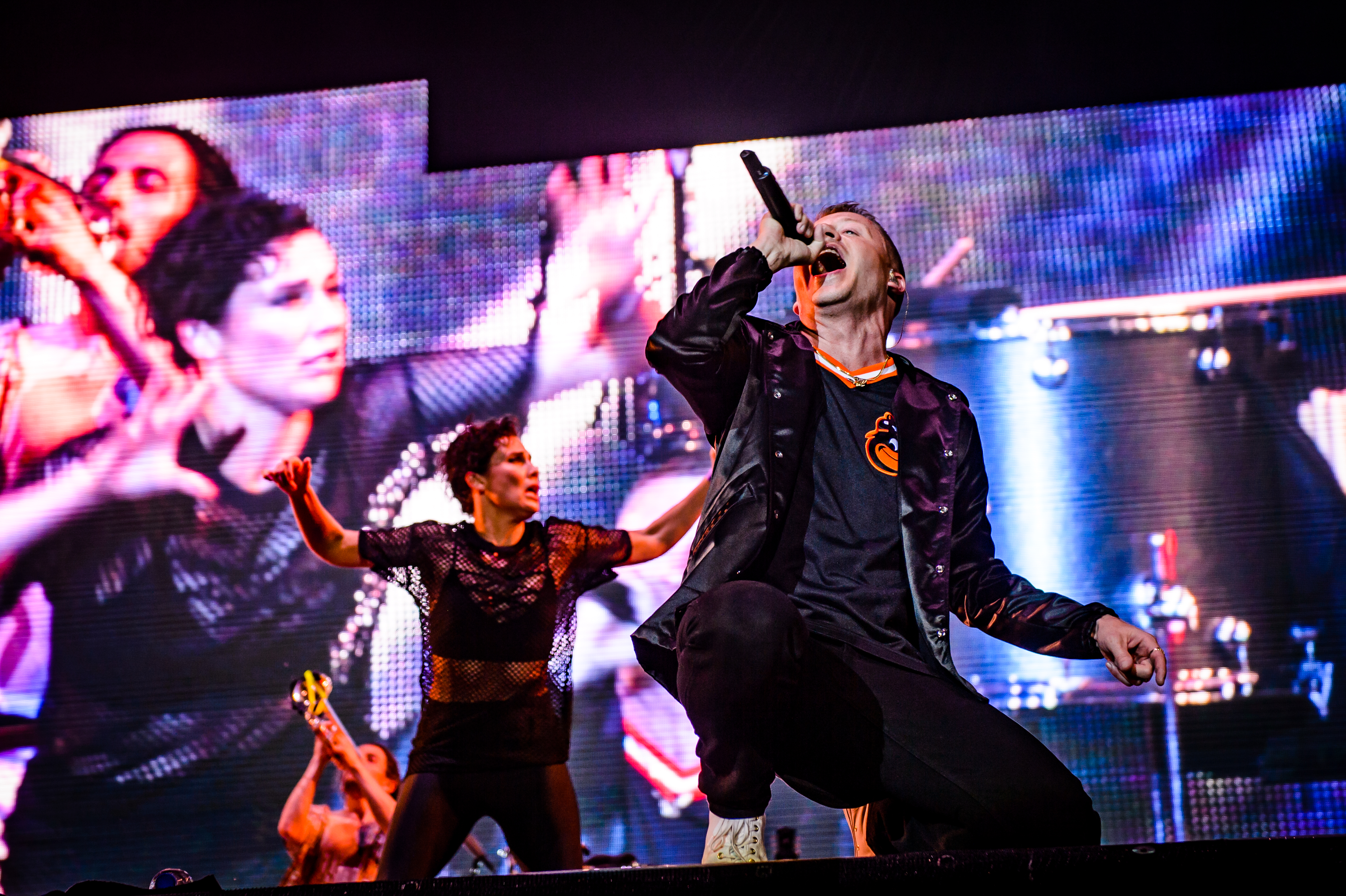 'Rock im Park 2017; Nürnberg': 'Macklemore & Ryan Lewi'